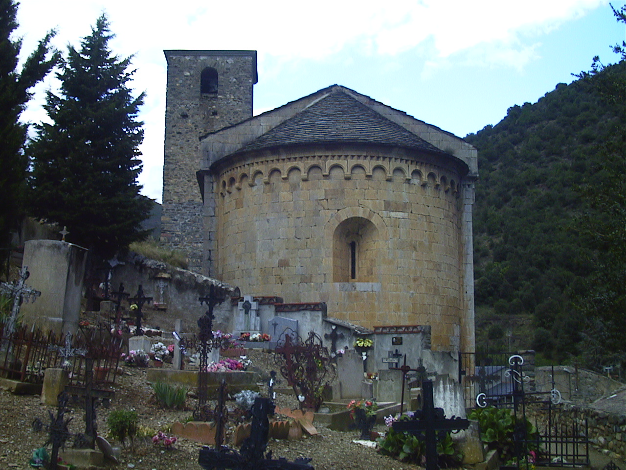 Église Saint-Jean-Baptiste de Conat, (Inscrit, 1985) .